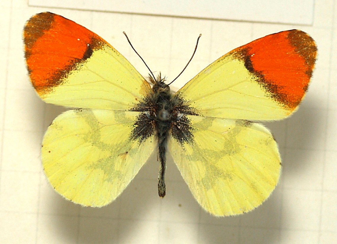 Anthocharis euphenoides